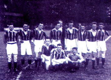 Vitesse in 1926